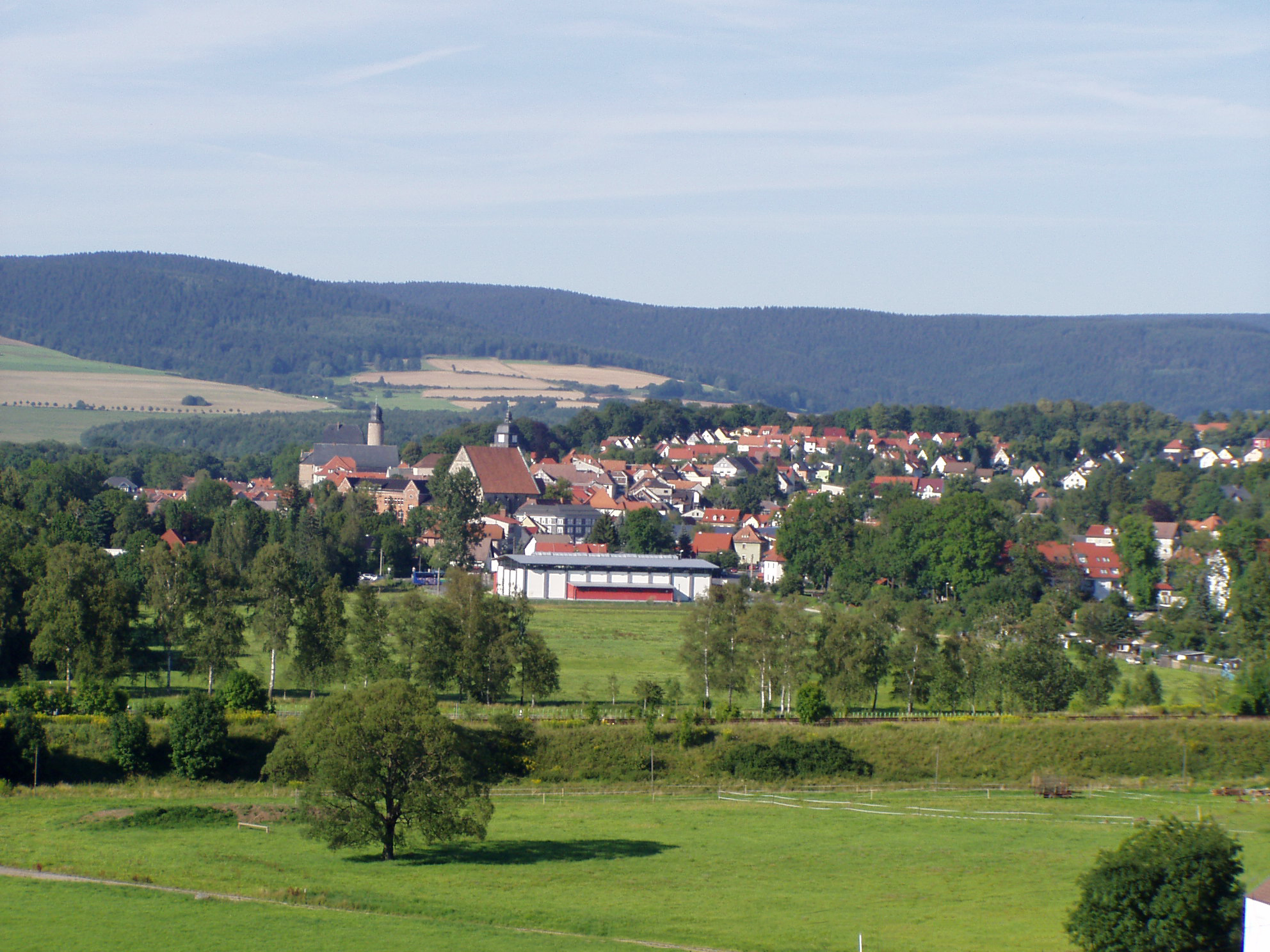 Eisfeld